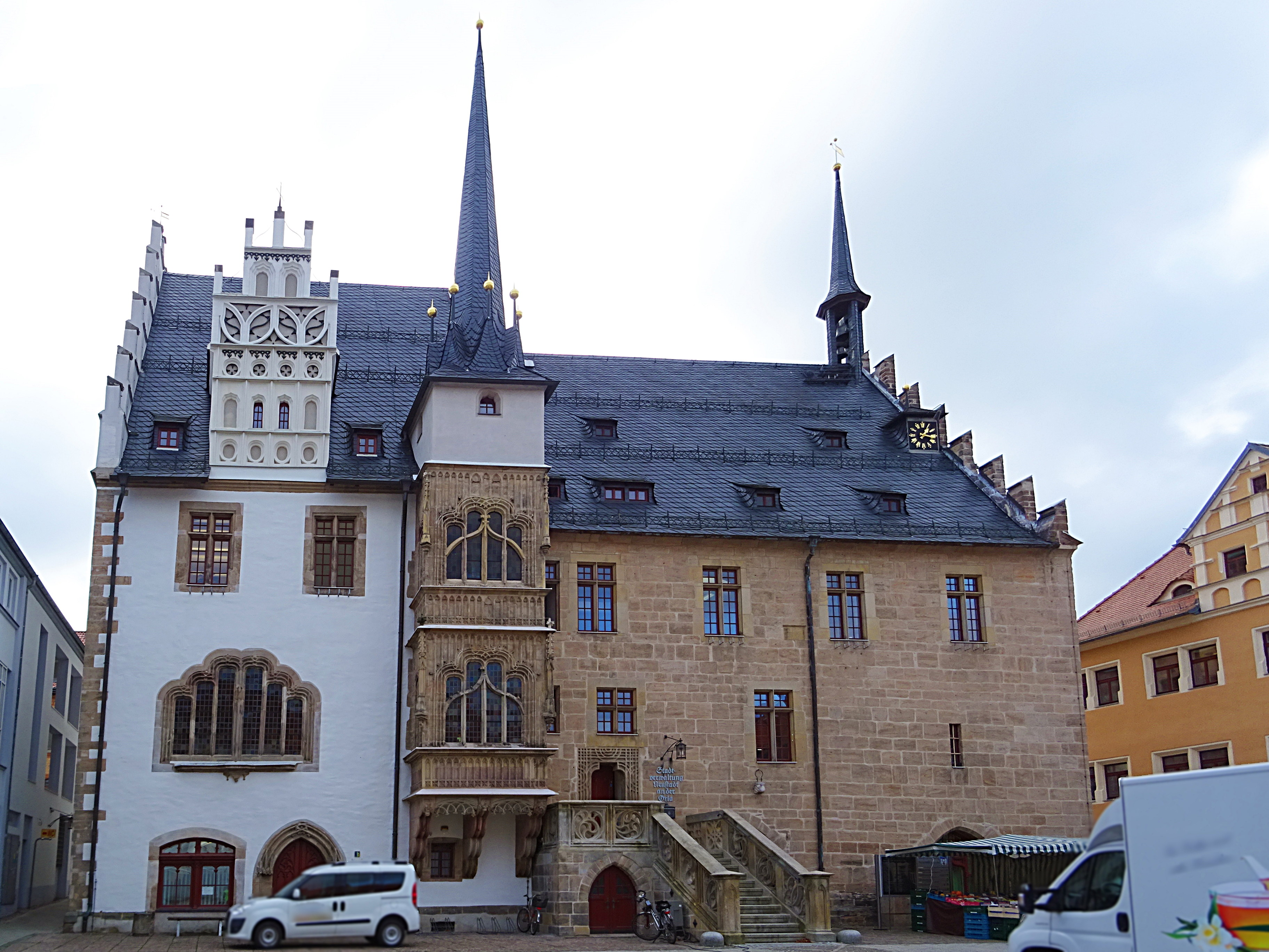 Rathaus Neustadt an der Orla vom Marktplatz gesehen